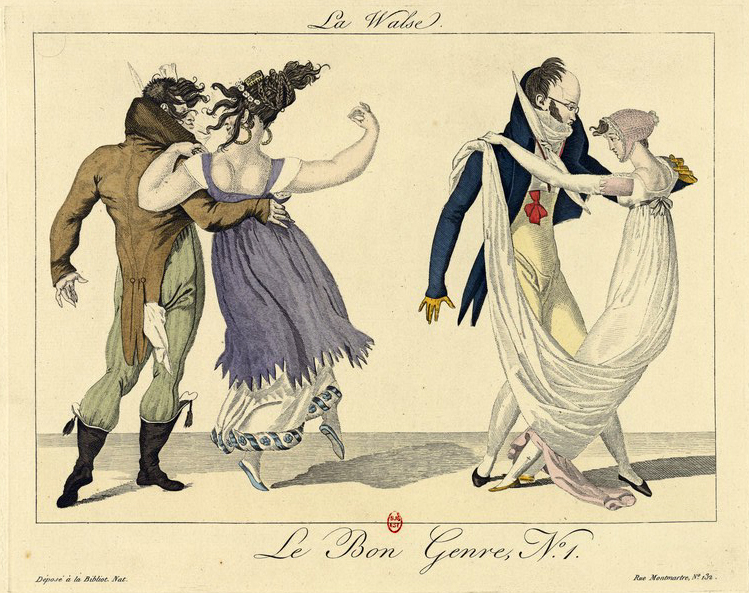 Gravure coloriée à la main de la série Le Bon Genre publiée par Pierre de la Mésangère.